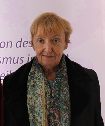 Im Rahmen des SPÖ-Frauensalons las Christine Nöstlinger, eine der bedeutendsten österreichischen Autorinnen, am Sonntag, 4. März bei einer Matinee im Moviemento in Linz aus ihrem Buch „Iba de gaunz oamen Leit“.